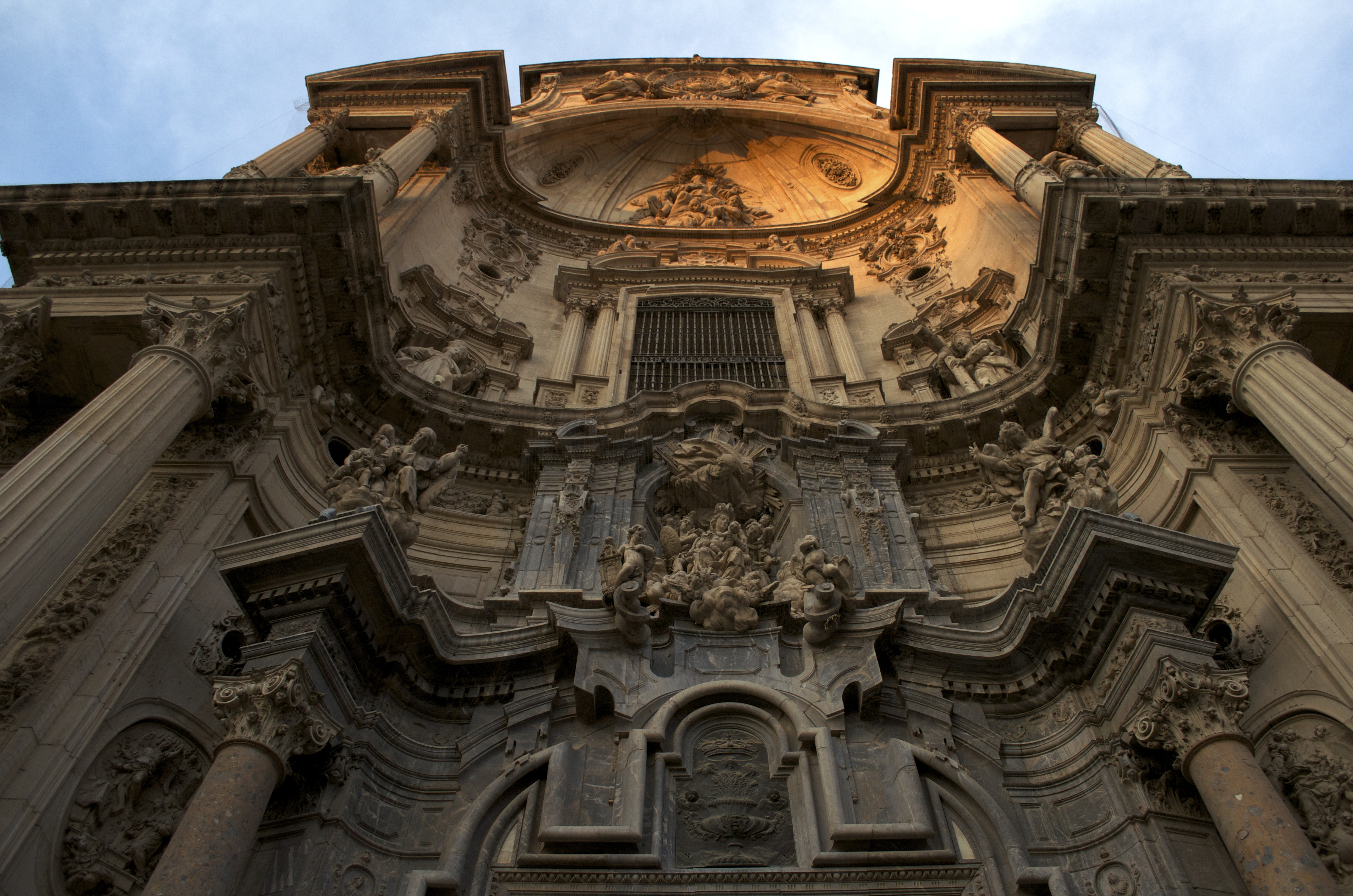 Detalle de la fachada de la Catedral de Murcia